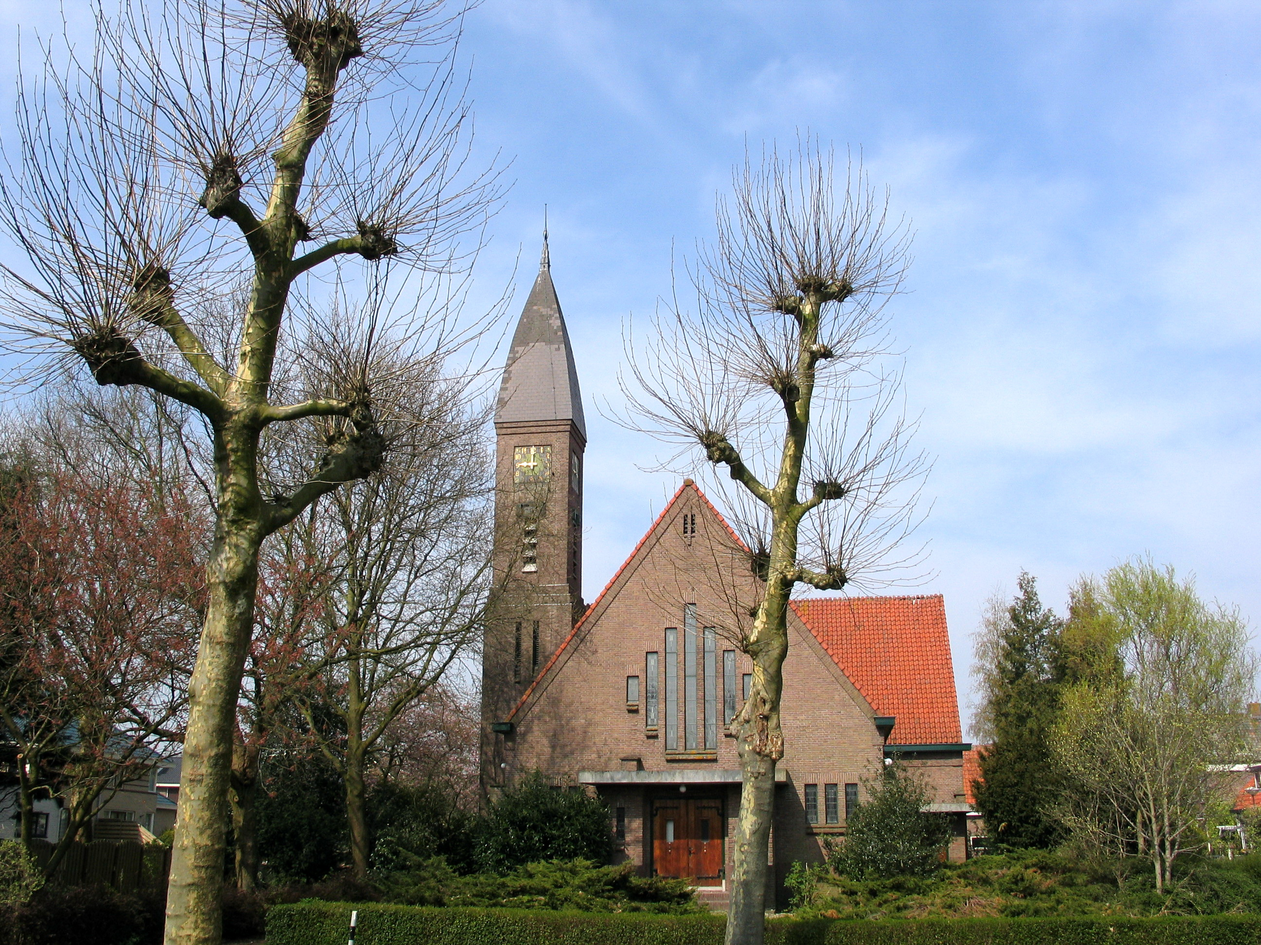 Kerk te Amstelhoek, Piet Heinlaan 3 Jaar:1925 Architect: B.W. Plooij